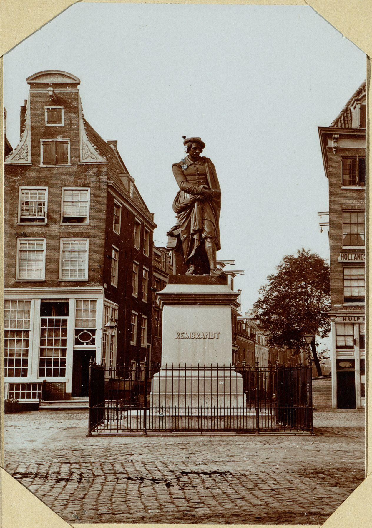 Beschrijving Het Standbeeld van Rembrandt op het voormalige Kaasplein (sic) vóór de Reguliersdwarsstraat - verplaatst -Het standbeeld op zijn eerste locatie op de grens van Thorbeckeplein en Rembrandtplein (voorheen Botermarkt). Oorspronkelijke kabinetfoto uitgegeven door A. Jager. Foto 31 uit het album van W.J.R. Dreesmann.Documenttype fotoCollectie Collectie Atlas DreesmannDatering 1867 t/m 1876Geografische naam ThorbeckepleinInventarissen 010094000451 Generated with Dememorixer